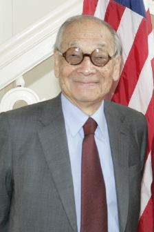 I.M. Pei